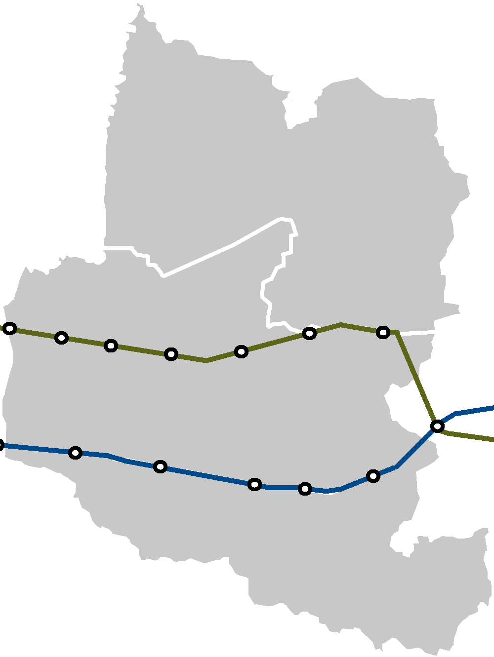 نقشه خطوط مترو سئول در شهر بوچئون